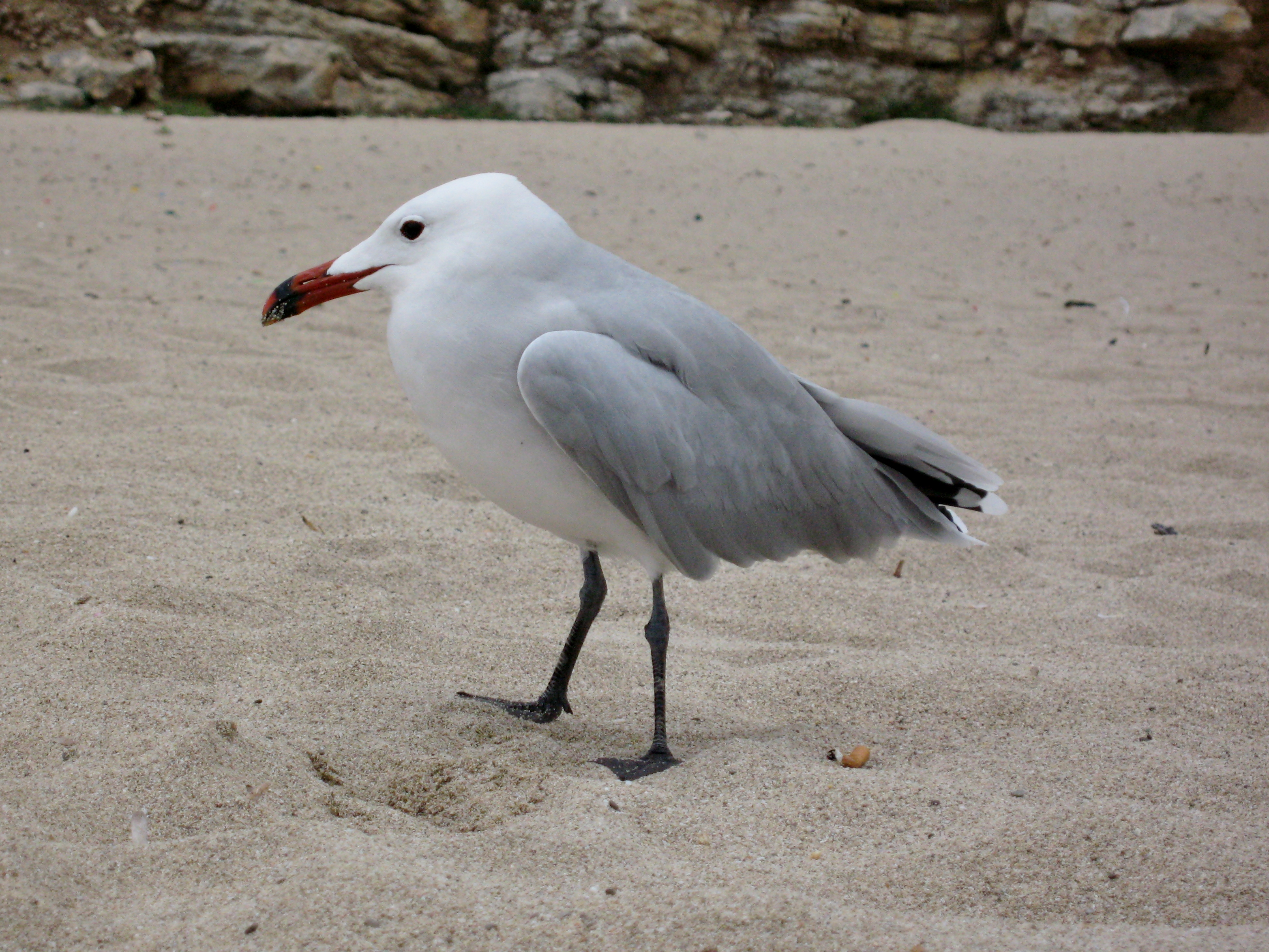 Korallenmöwe (Larus audouinii) an der Cala Torta, Gemeinde Artà, Mallorca, Spanien